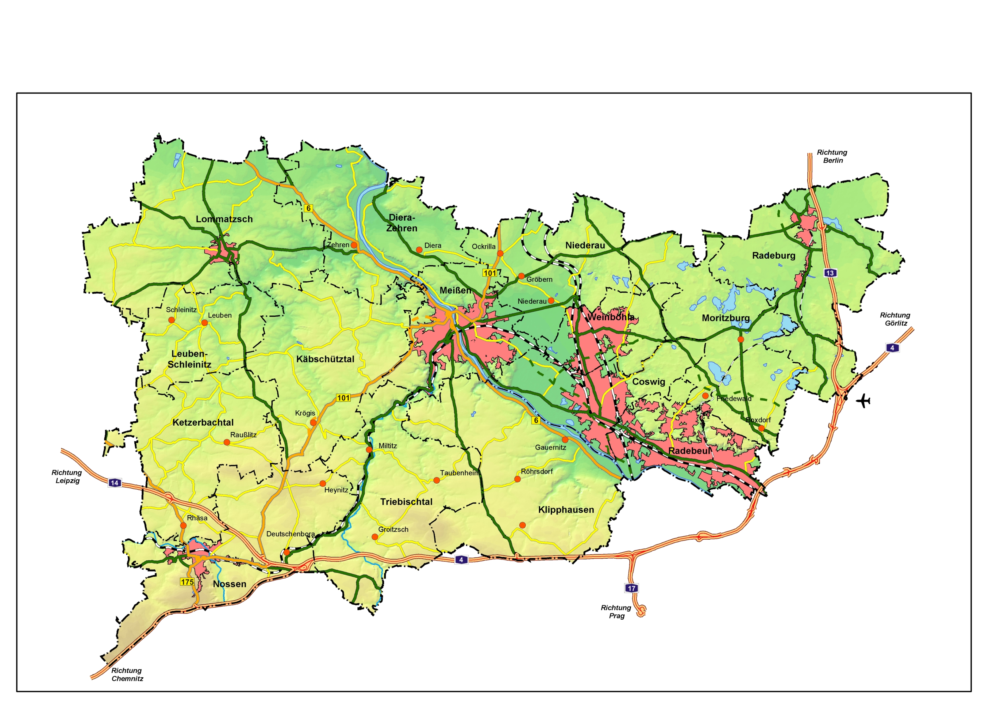 K LK Meissen